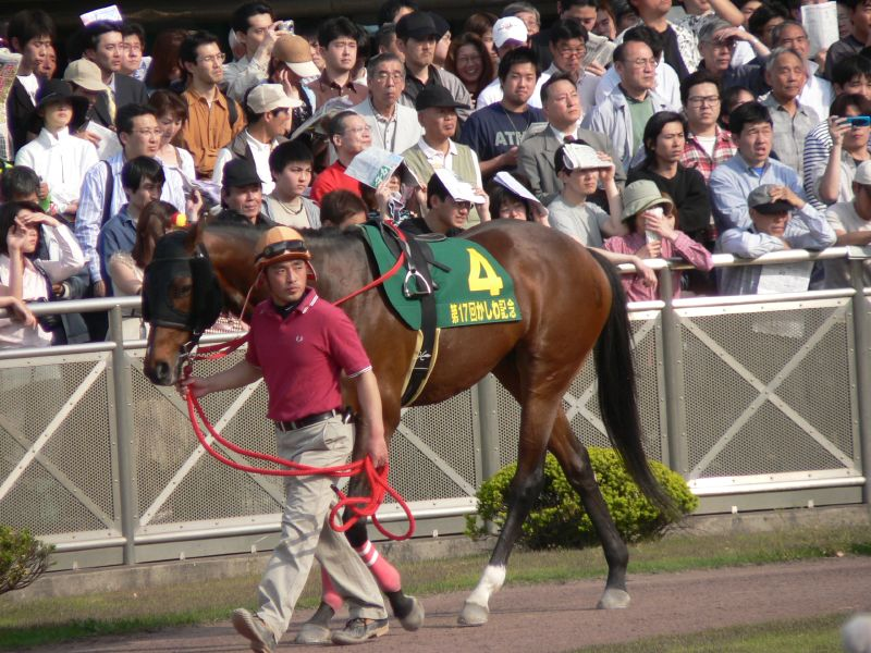 ストロングブラッド（第17回かしわ記念）